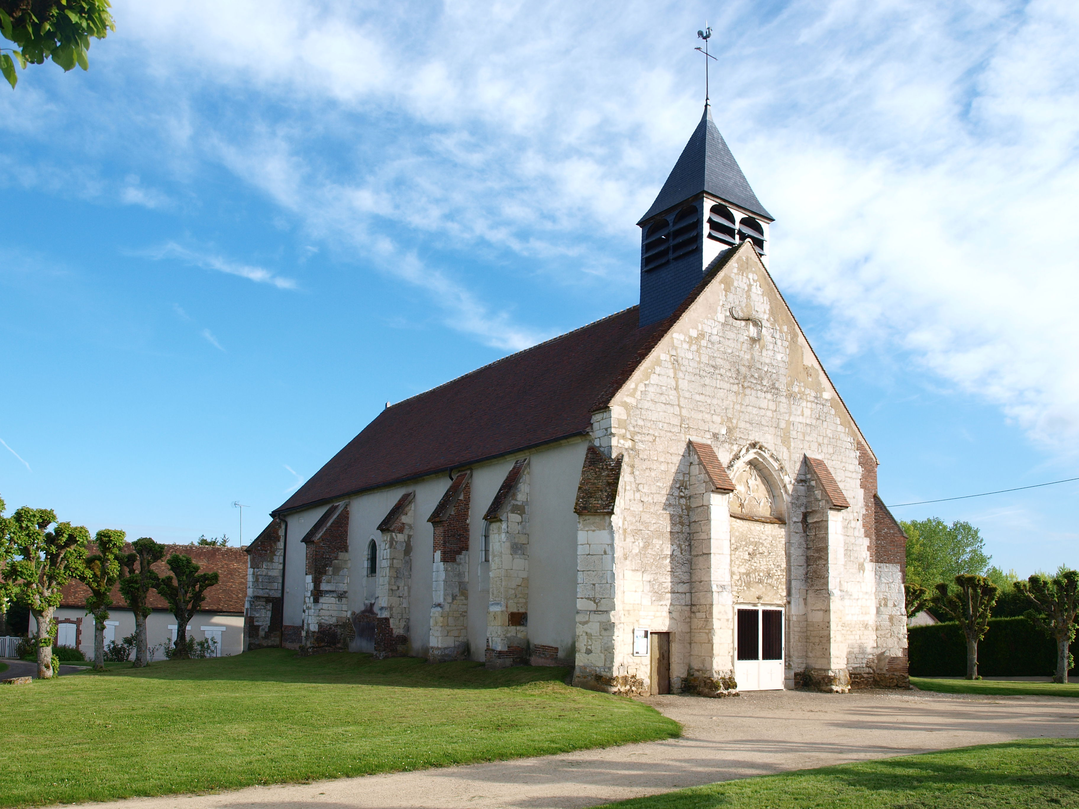 Laduz (Yonne, France) ; l'église